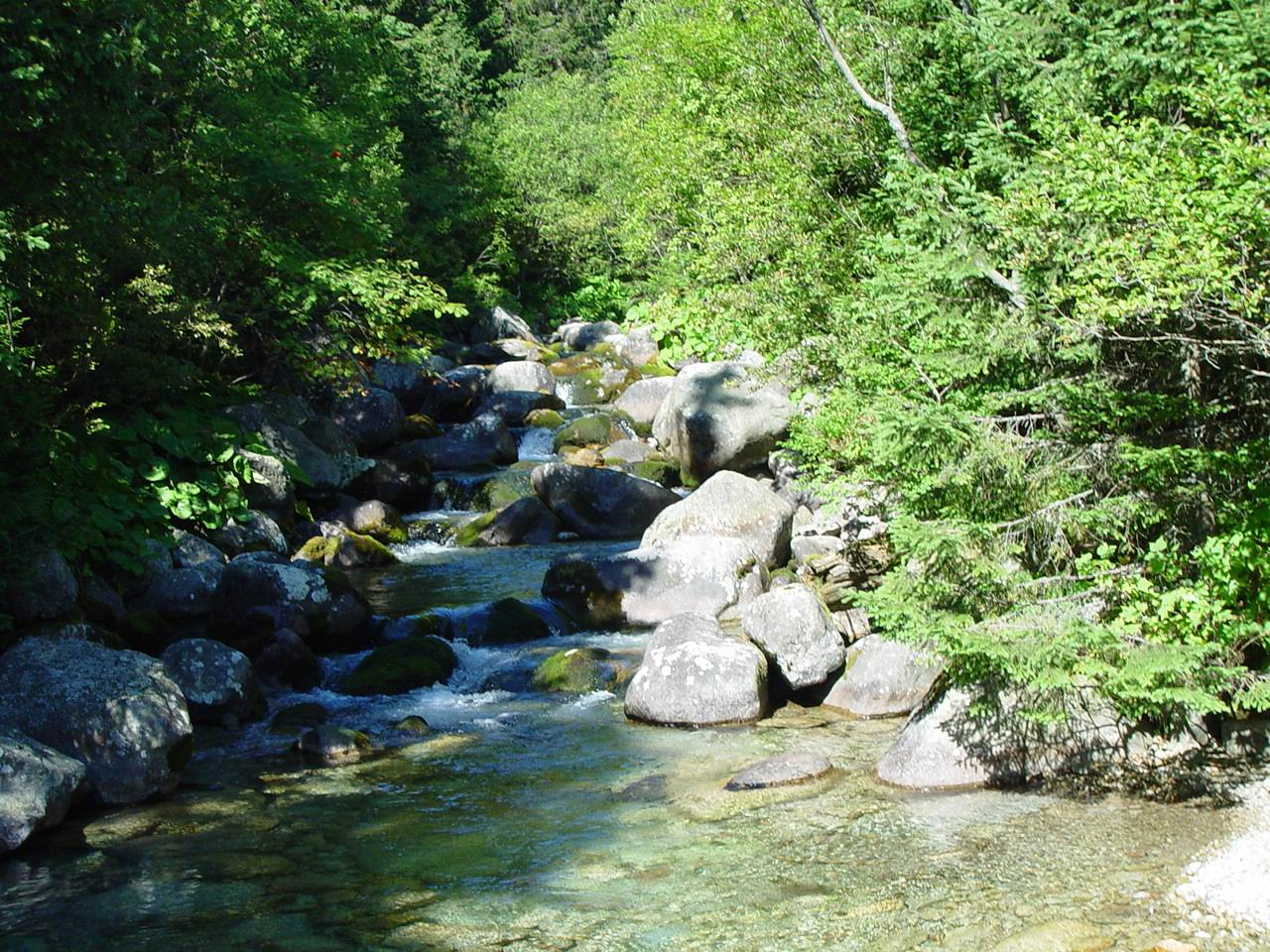 Biela voda Kežmarská - pri Šalviovom prameni